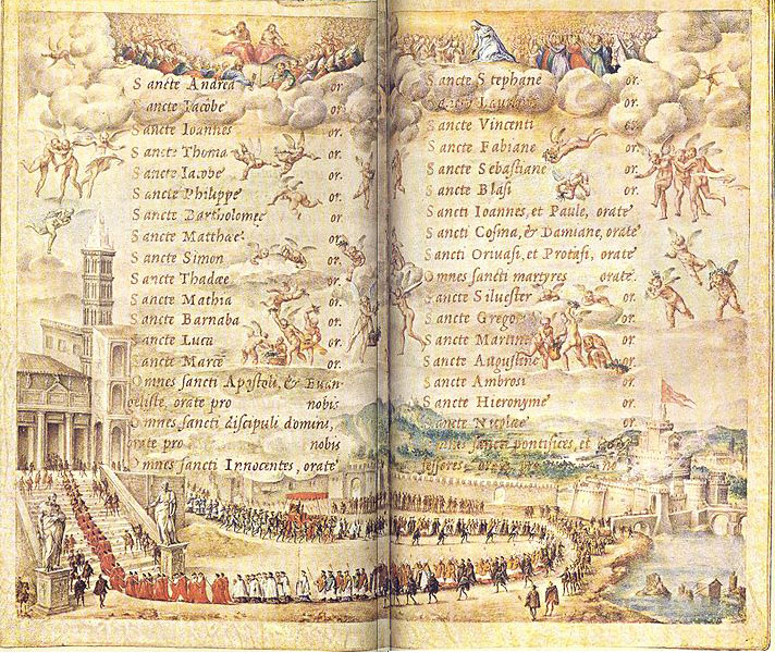 Fronleichnamsprozession